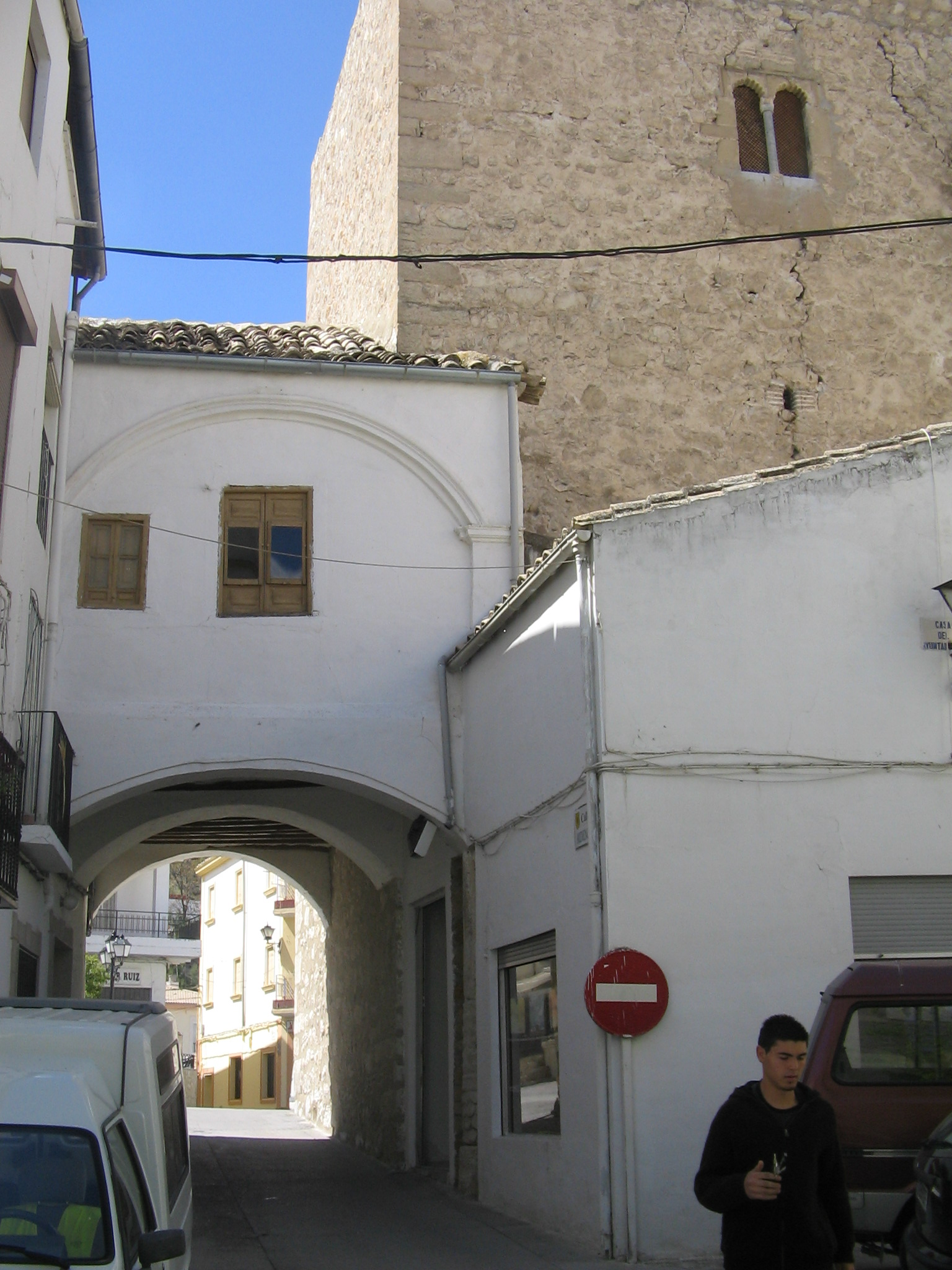 Vista de la plaza principal de Jimena (Jaén), España.